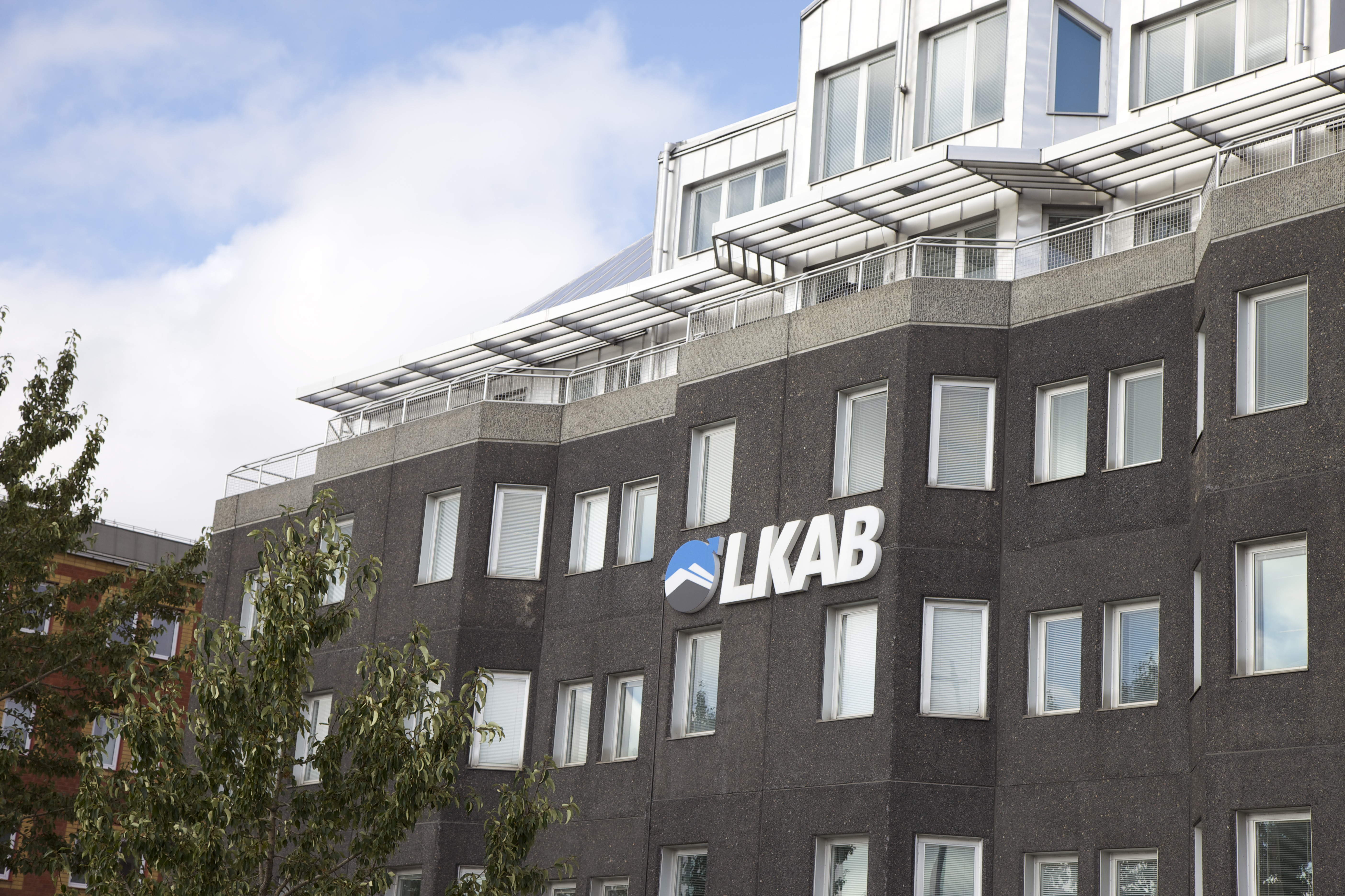 LKAB huvudkontor i Luleå, Norrbotten